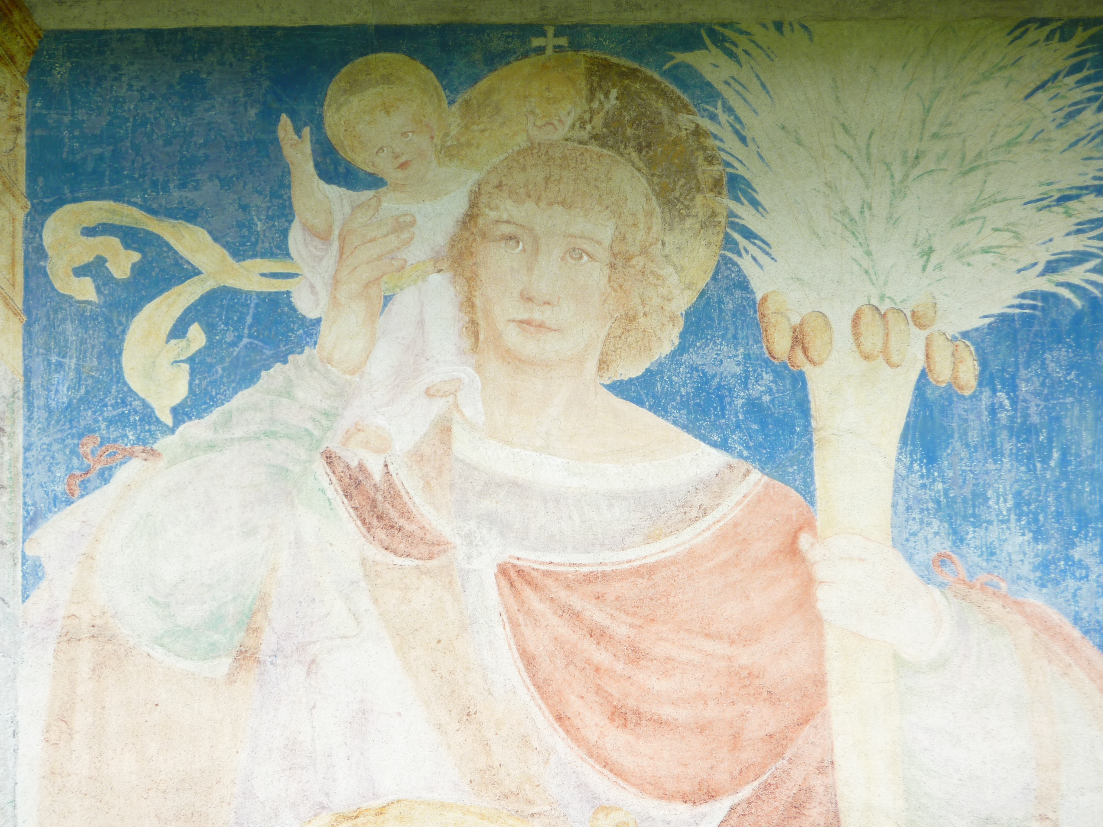 Filialkirche hl. Martin in Möderndorf, Hermagor, Kärnten, Österreich - Fresko hl. Christophorus an der Südfassade, Urban Görtschacher um 1525 zugeschrieben